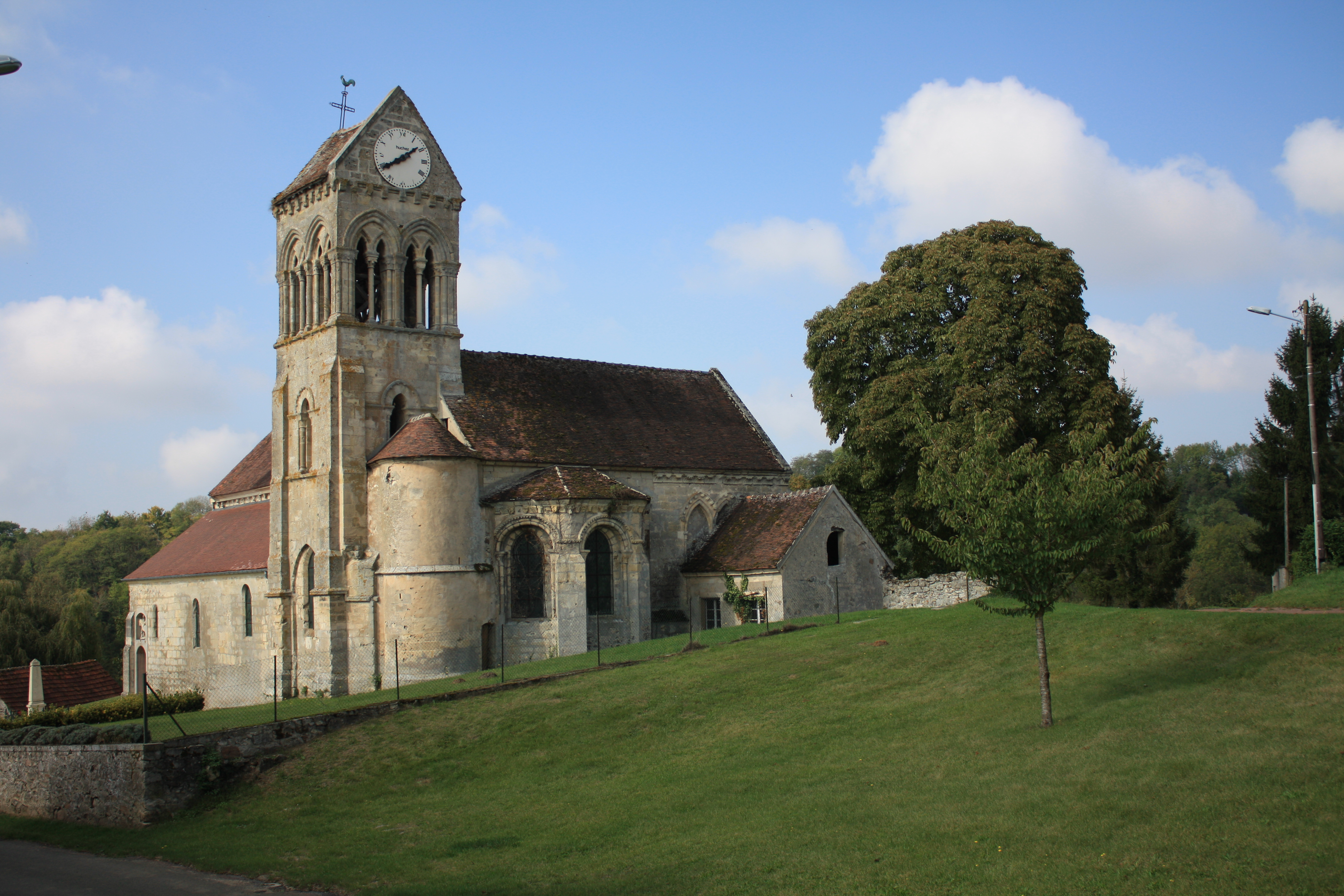 Église Saint-Martin de Bonnesvalyn